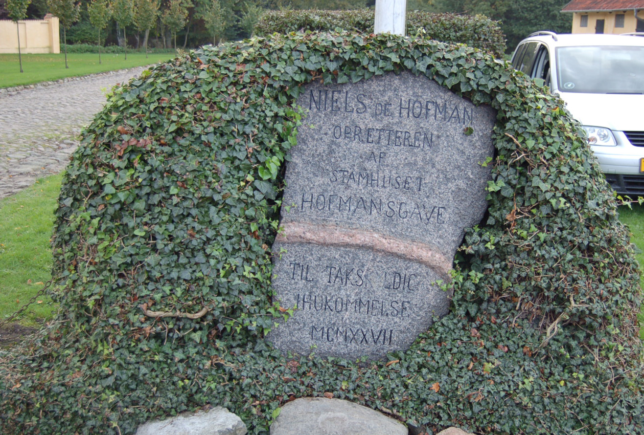 Mindestenen over Niels de Hofman, Hofmansgave